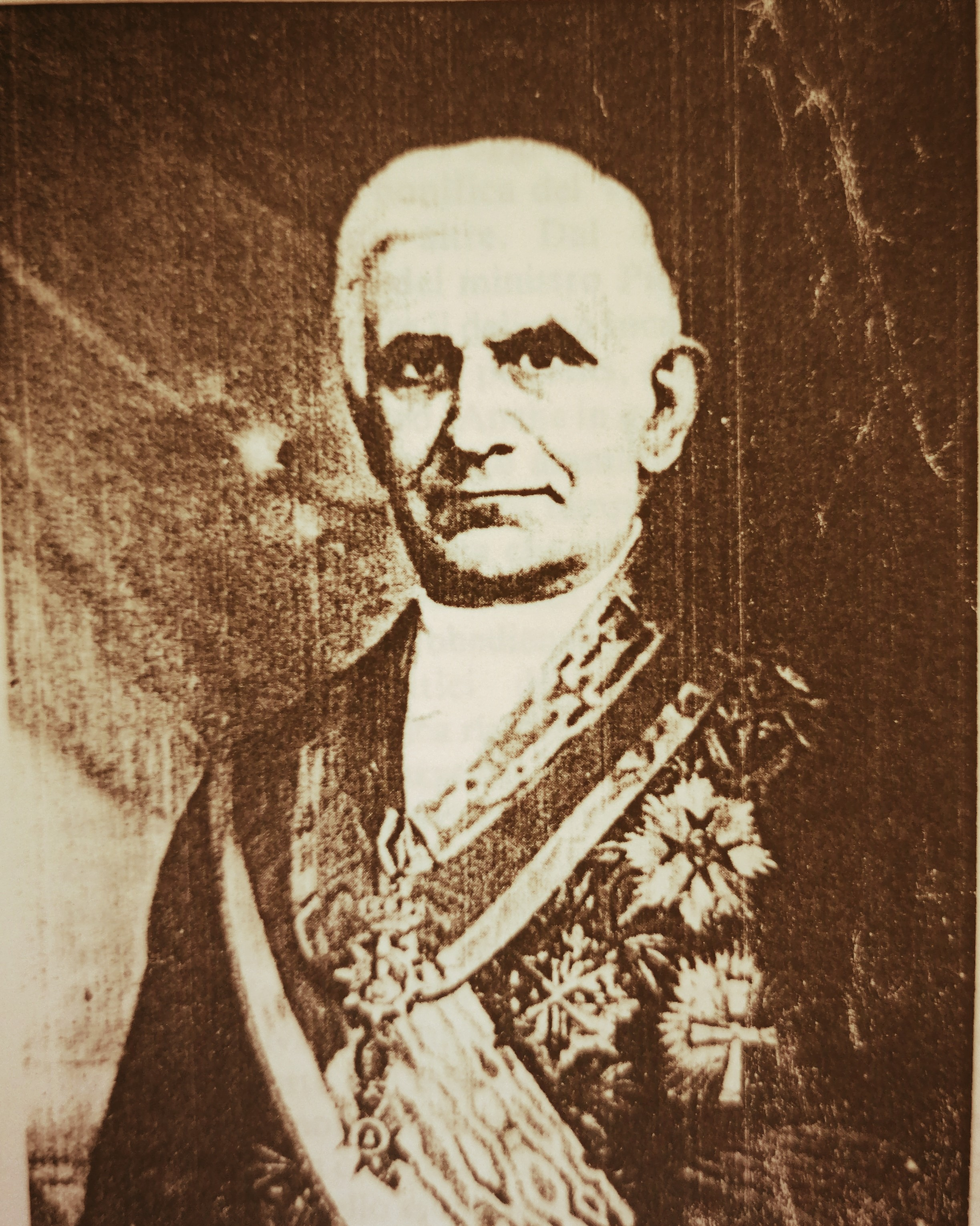 Salvatore Murena in uniforme con decorazioni.